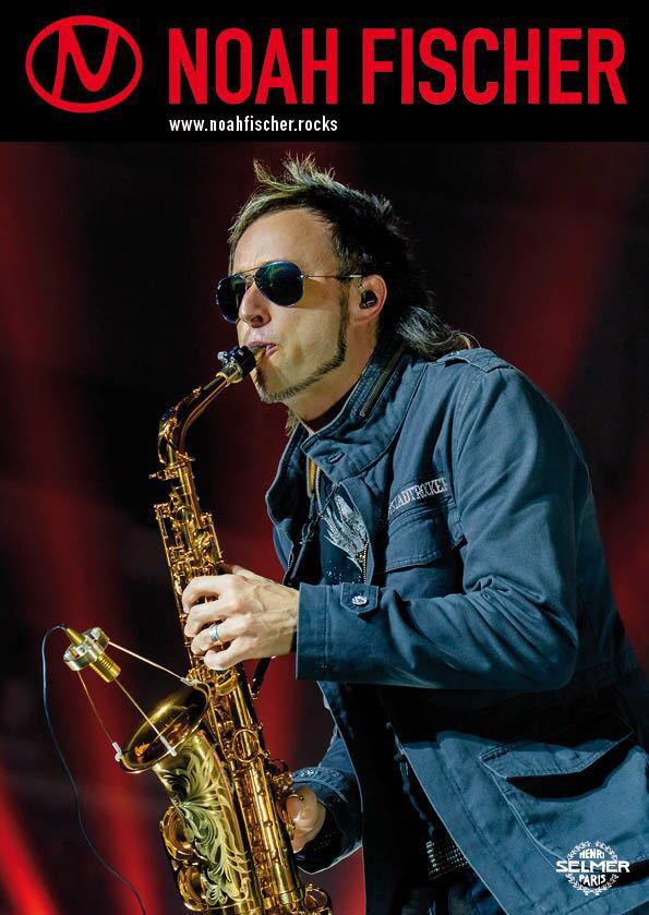 Noah Fischer auf Tour mit Udo Lindenberg, 2017